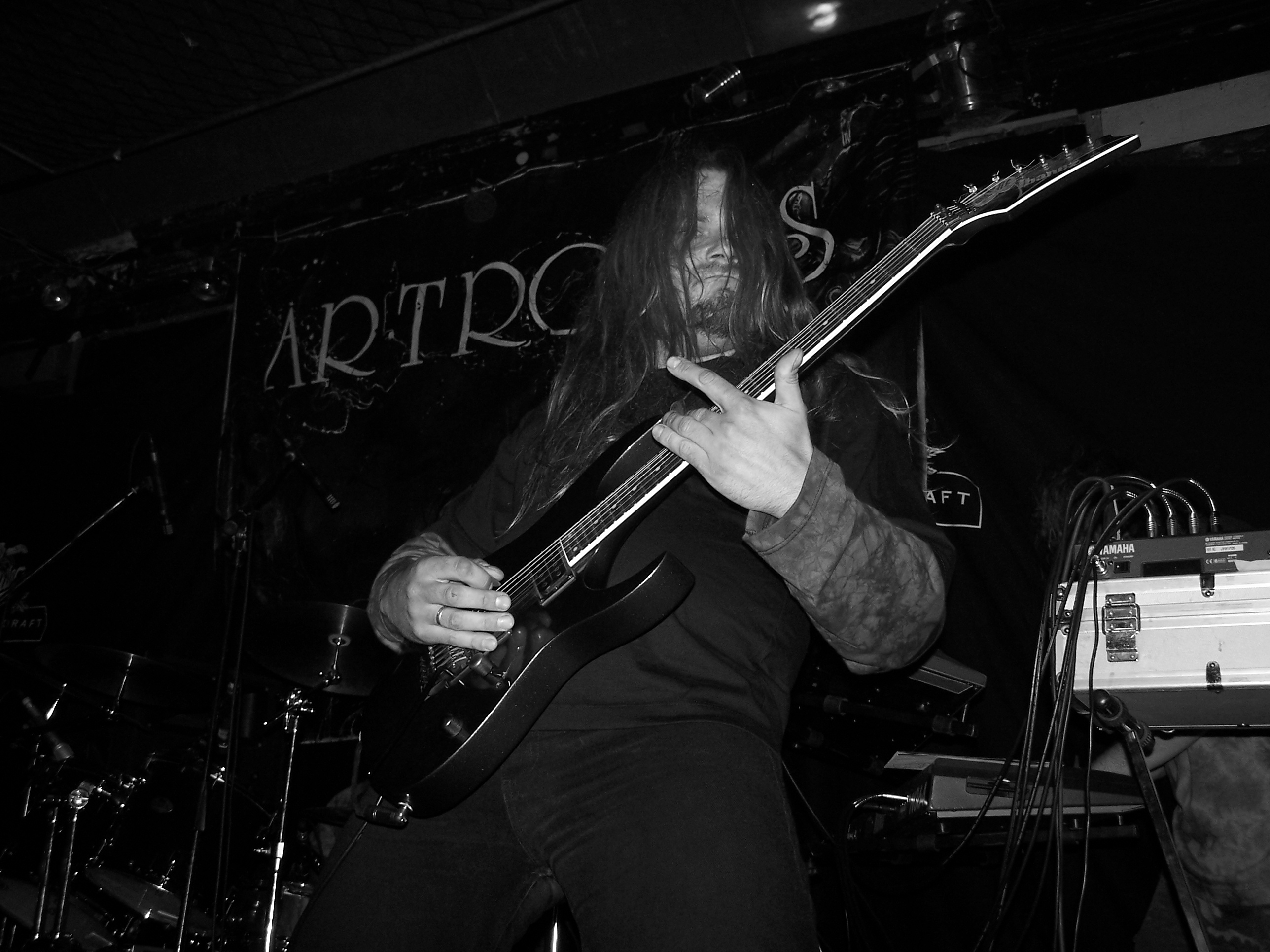 Krystian "MacKozer" Kozerawski - gitarzysta zespołu Artrosis podczas koncertu w katowickim Mega Clubie.